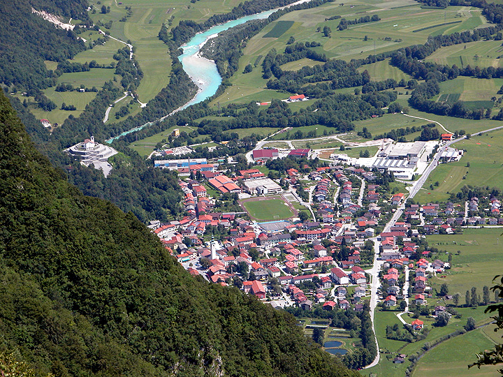 Kobarid z grebena Stola